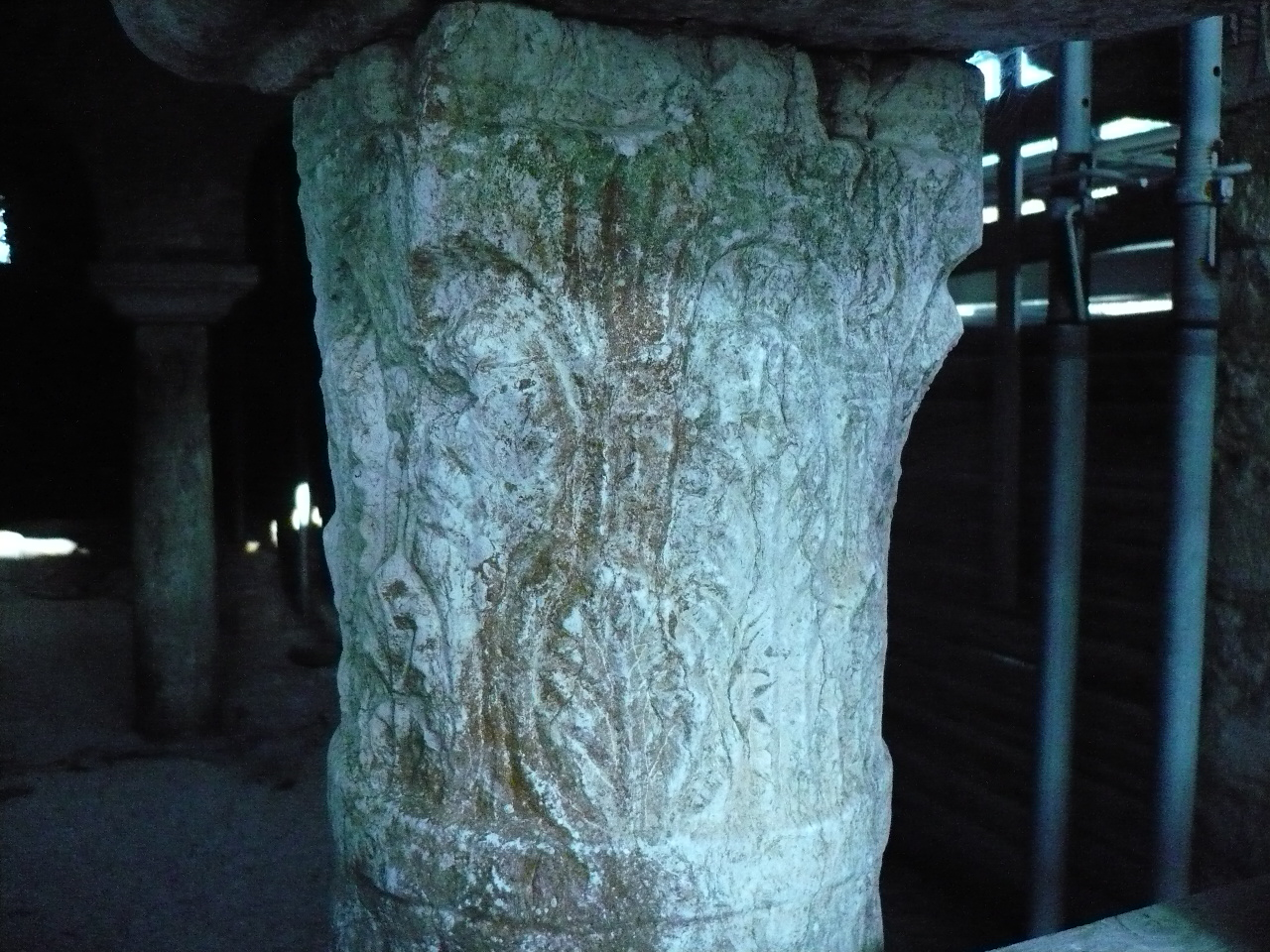 Igreja de São Gião da Nazaré - obras de restauro